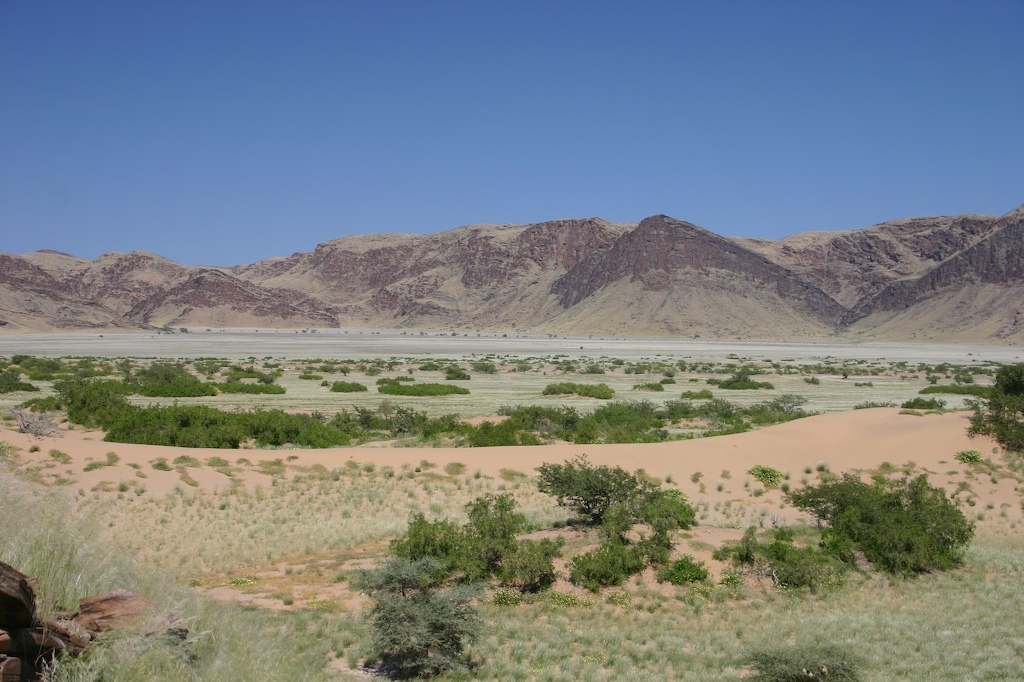 Hoanib Floodplain